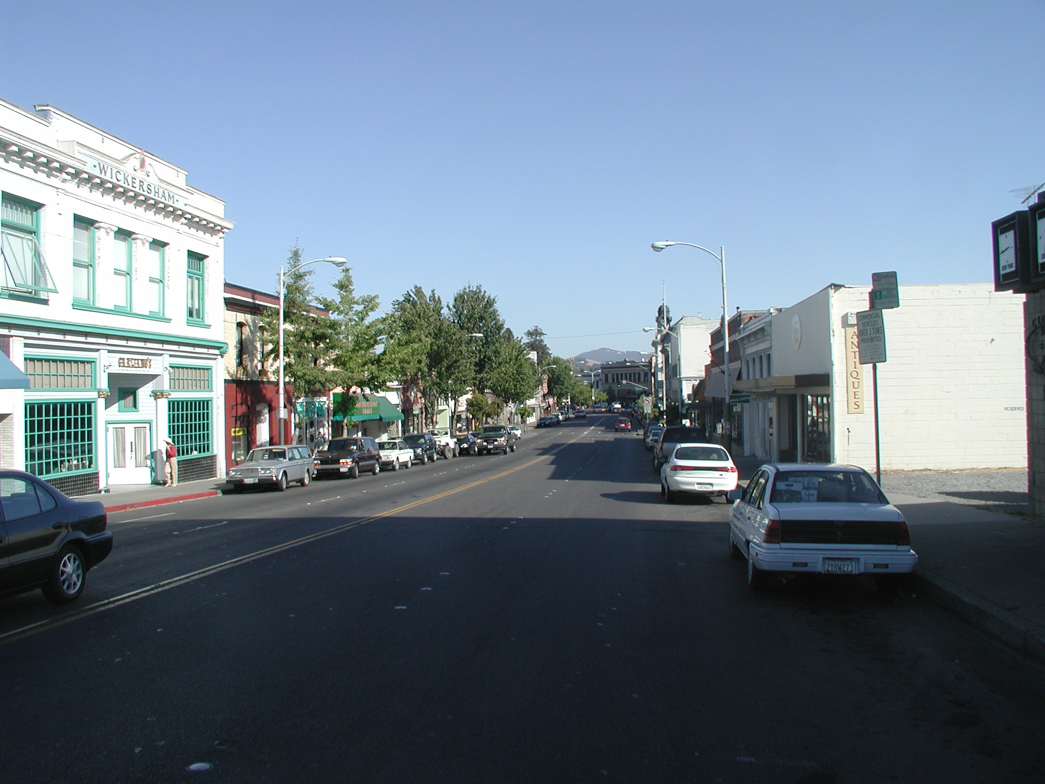 Petaluma, CA, Petaluma Blvd